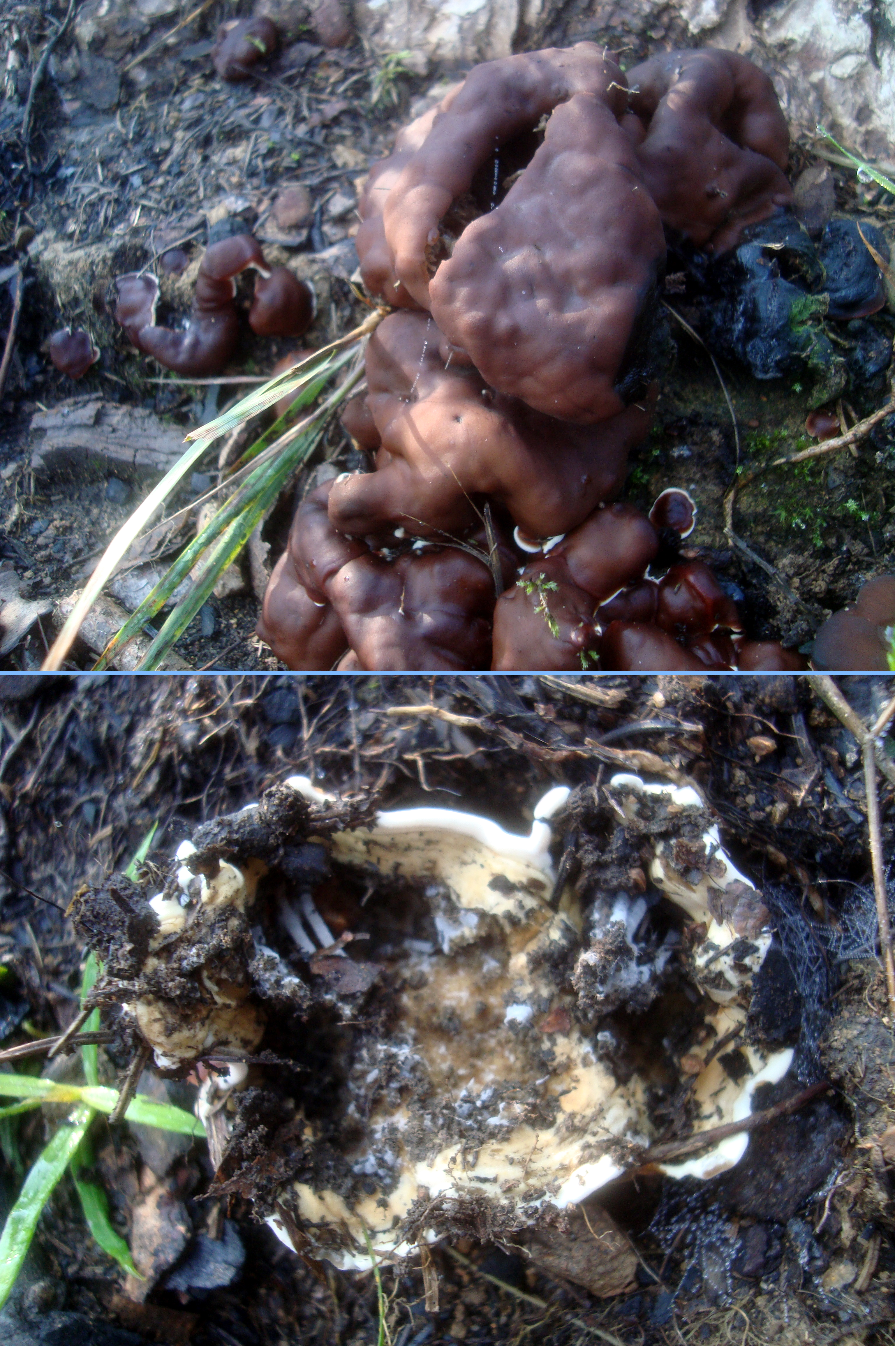 Houby z Podkomorských lesů, Česká republika, jižní Morava